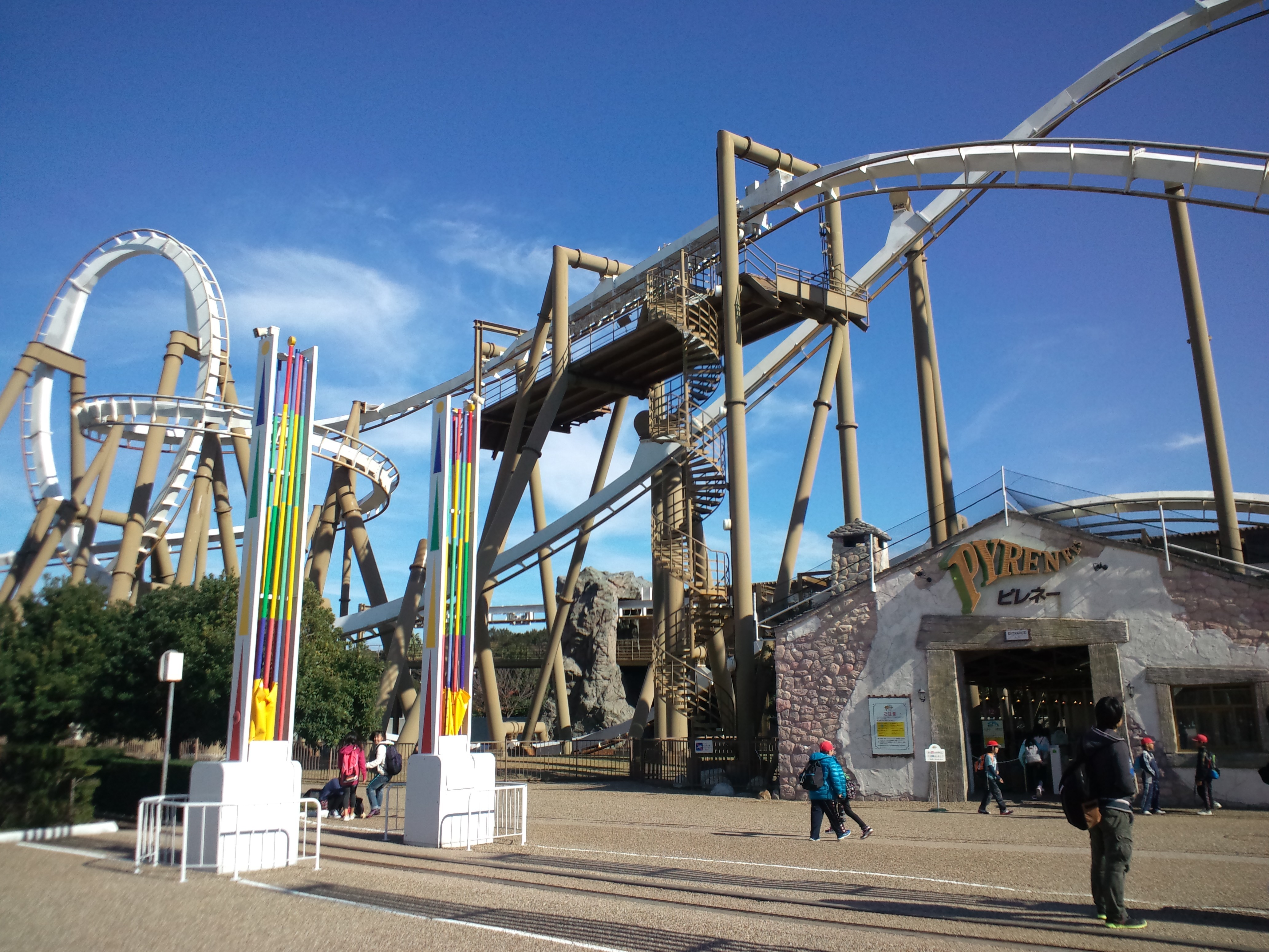 志摩スペイン村、パルケエスパーニャ ジェットコースター「ピレネー山脈」